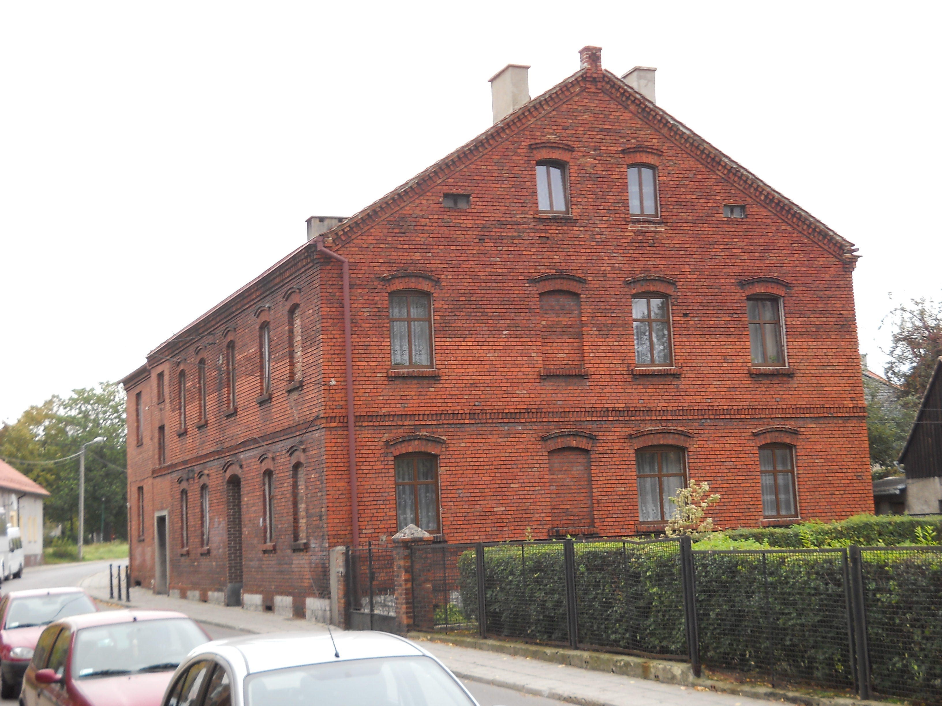 Kościół parafialny pw. św. Mikołaja, Dom sióstr, Pyskowice 03.60.